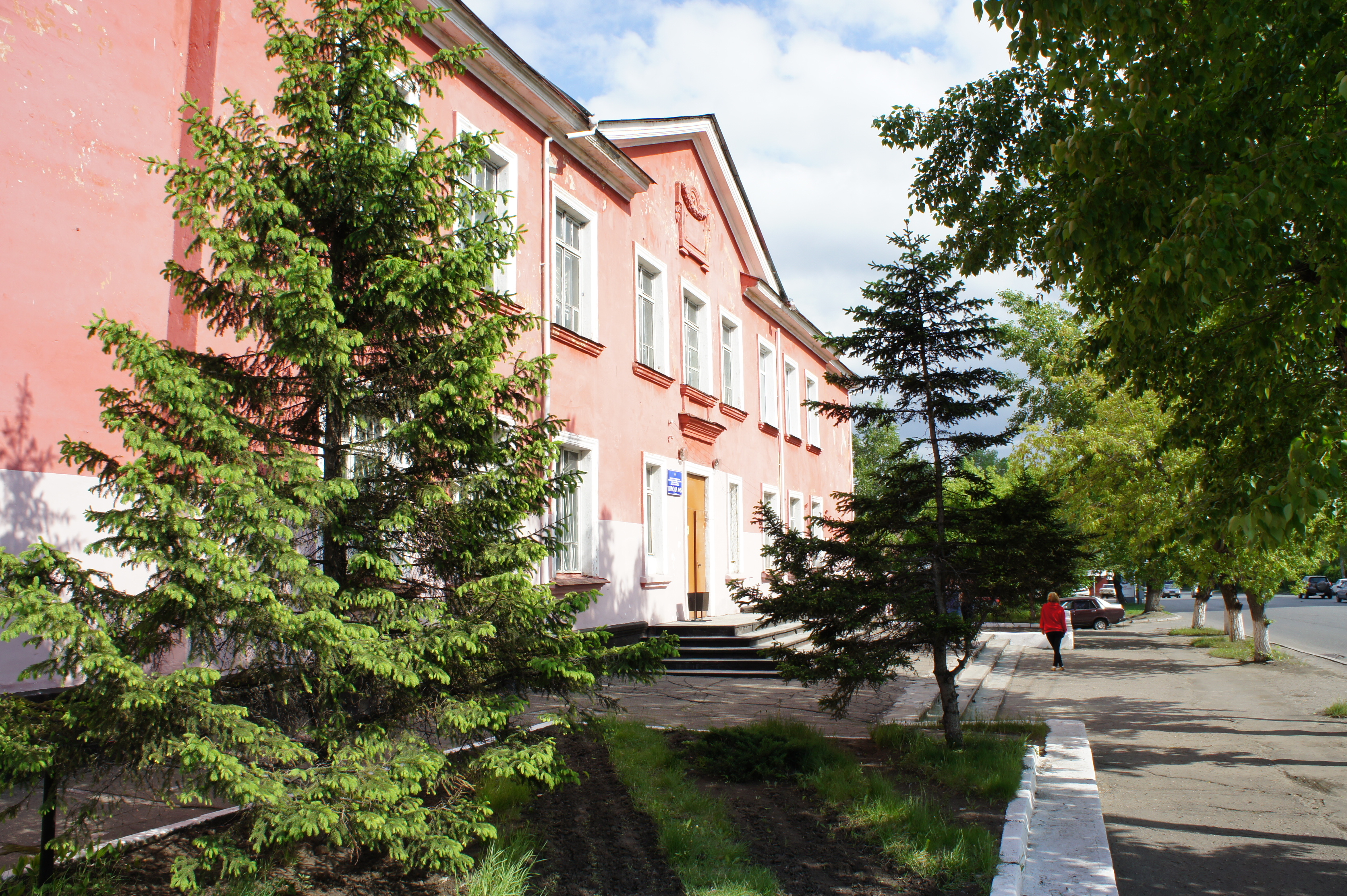 Здание МБОУ О(с)ОШ№6 г. Барнаула, май 2012